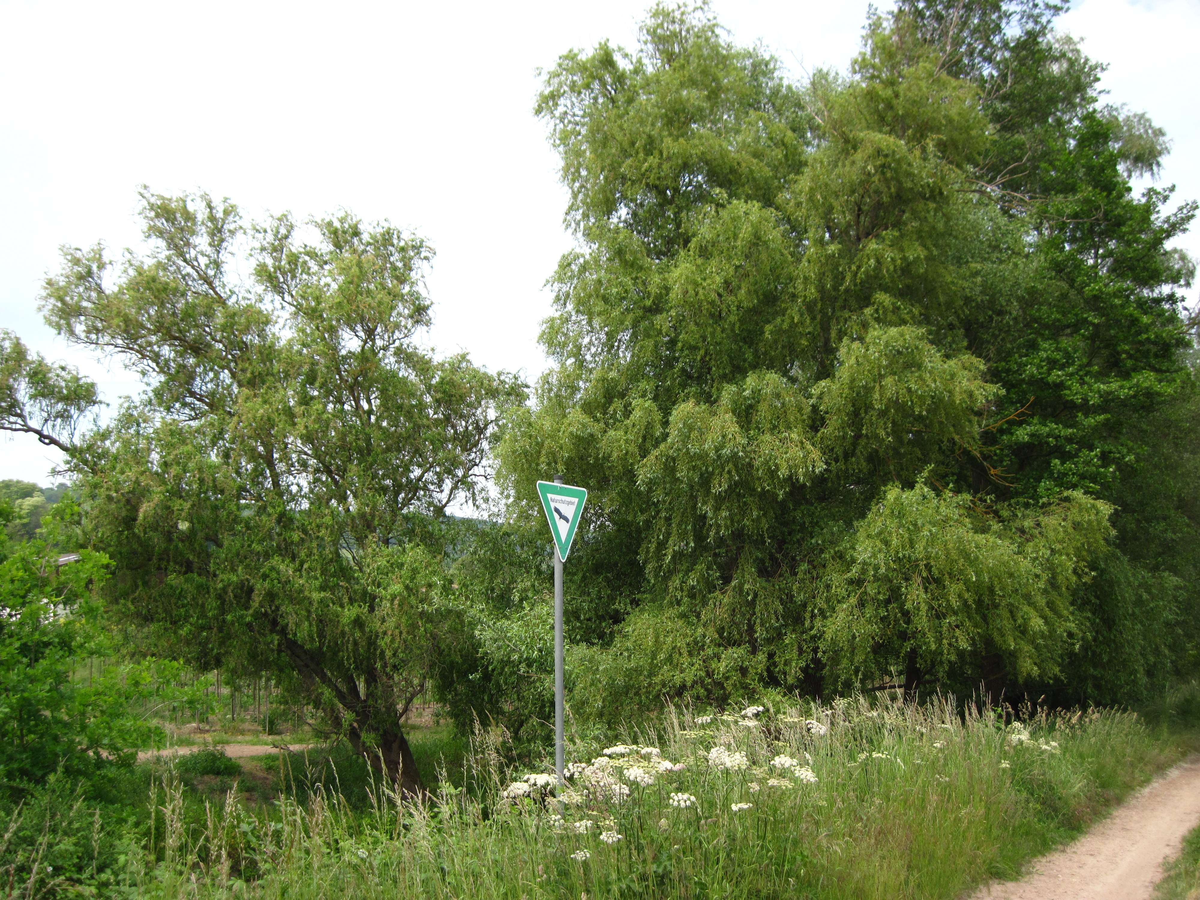 Naturschutzgebiet Gartenwiese im Landkreis Mainz-Bingen (Ingelheim / Schwabenheim): Blick auf den Ufergehölzsaum der Selz aus Weiden und Erlen unterhalb des Sportplatzes von Großwinternheim.